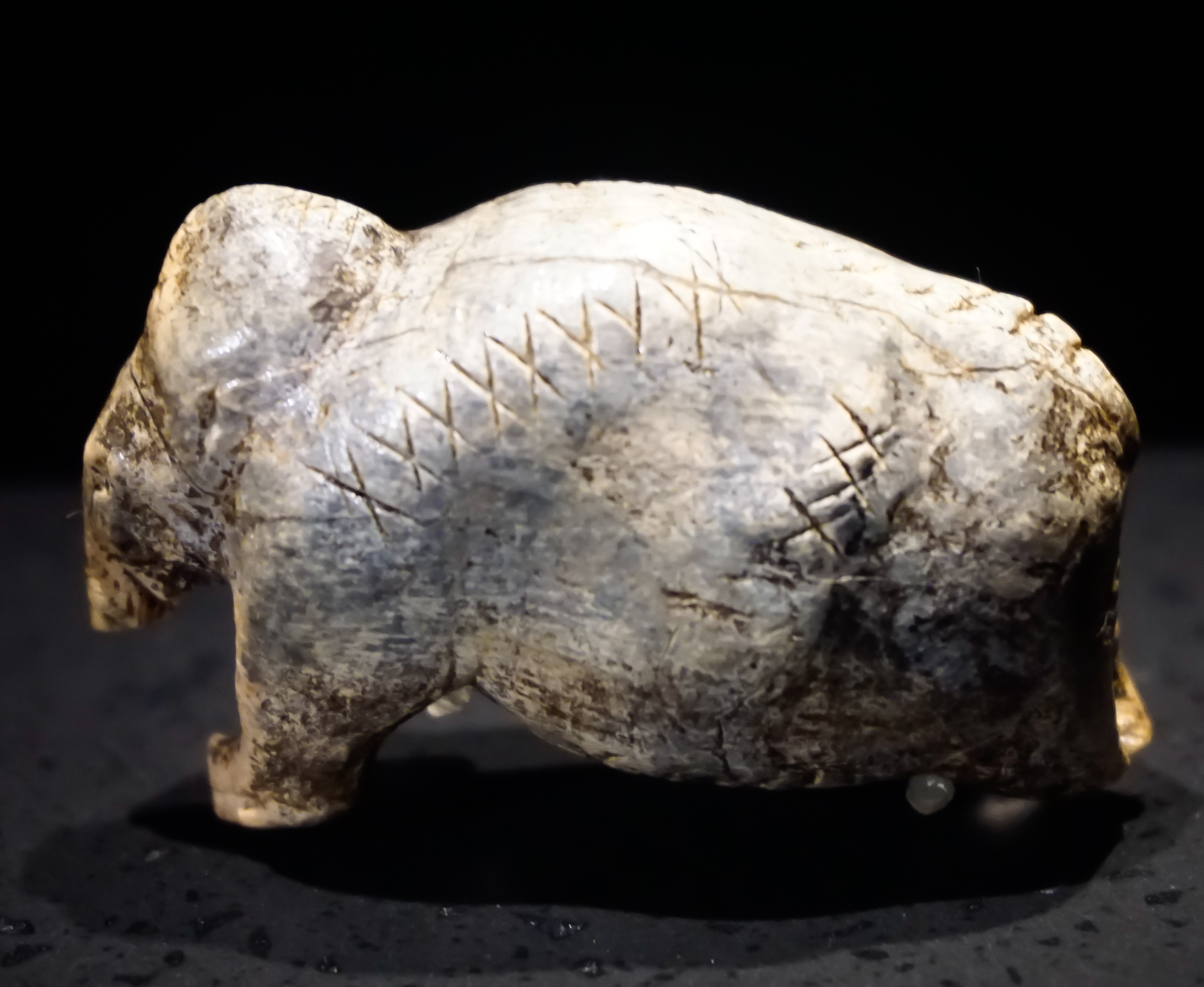 MUT: Museum der Universität Tübingen - Alte Kulturen - Sammlungen im Schloss Hohentübingen: Sammlung der Älteren Urgeschichte des Museums der Universität Tübingen - Tierplastik aus Mamutelfenbein, Vogelherdhöhle, etwa 40.000 Jahre alt